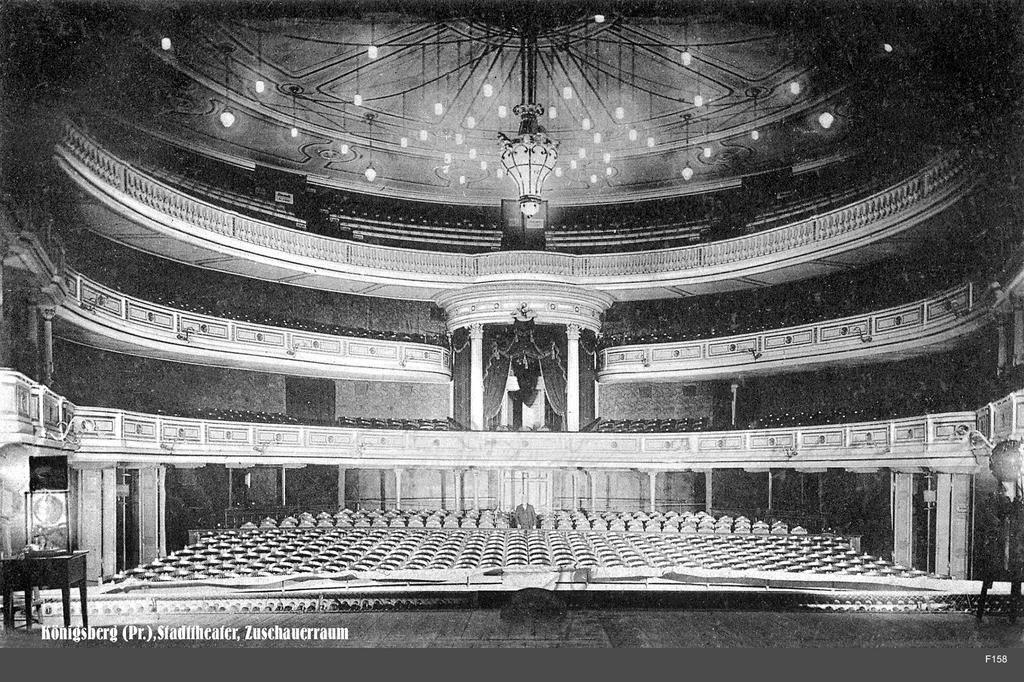 Zuschauerraum des Stadttheaters in Königsberg